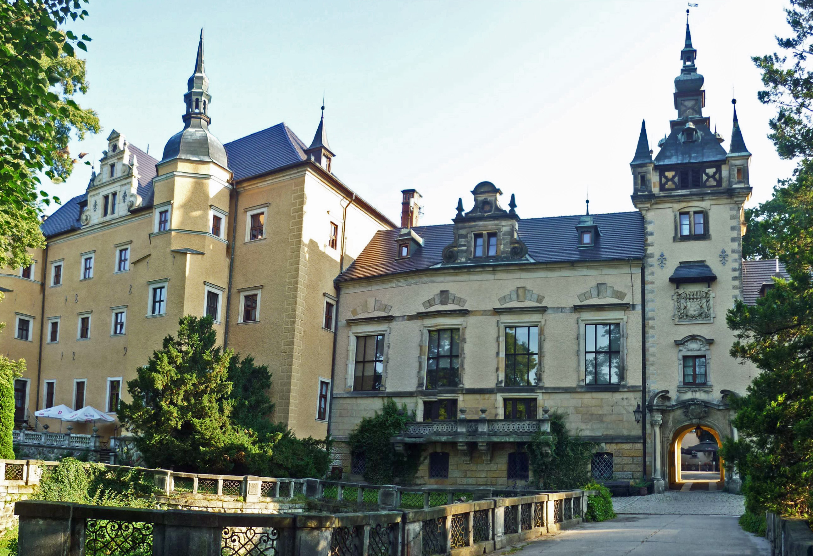 Kliczków 8 - zamek